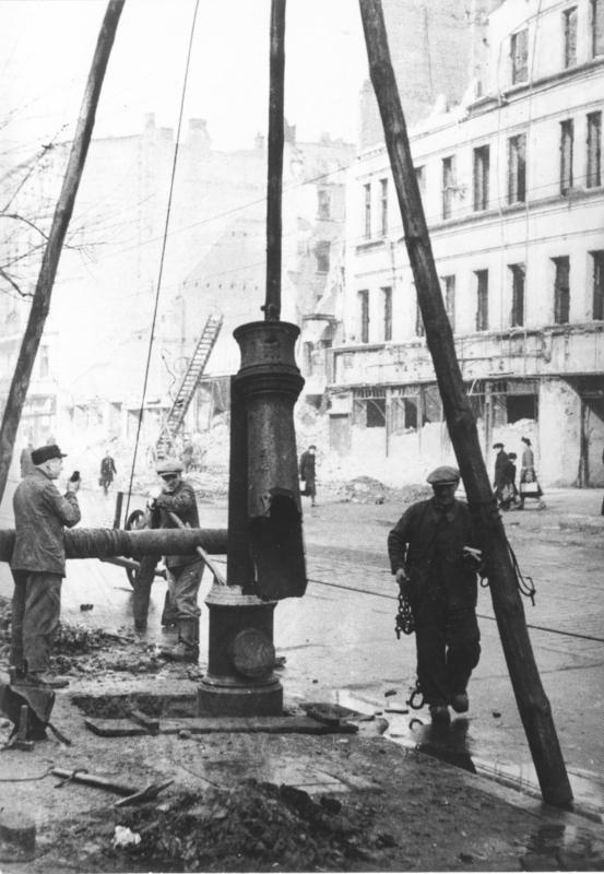 ADN-ZB/Donath Berlin, März 1947: Nach dem strengen Winter 1946/47 werden die eingefrorenen Pumpen wieder instandgesetzt.